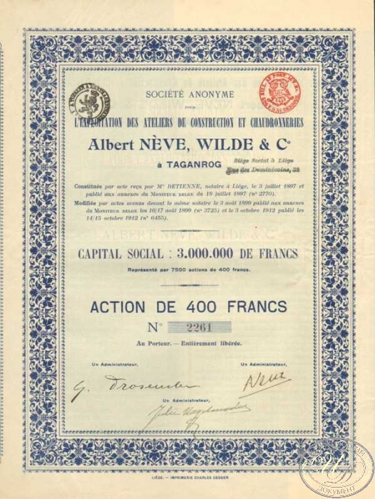 Акция в 400 франков (1912) "Анонимного Общества для эксплоатацiи машиностроительнаго и котельнаго заводовъ общества Альберт Невъ, Вильдъ и Ко въ Таганрогѣ"